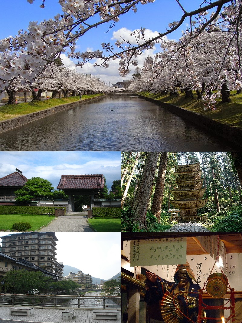 山形県鶴岡市のモンタージュ画像。